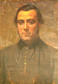 Portrait of Benjamín Lavaisse